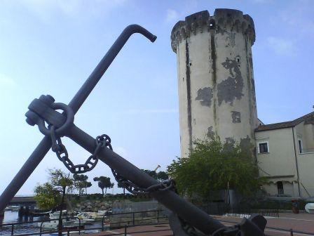 Formia